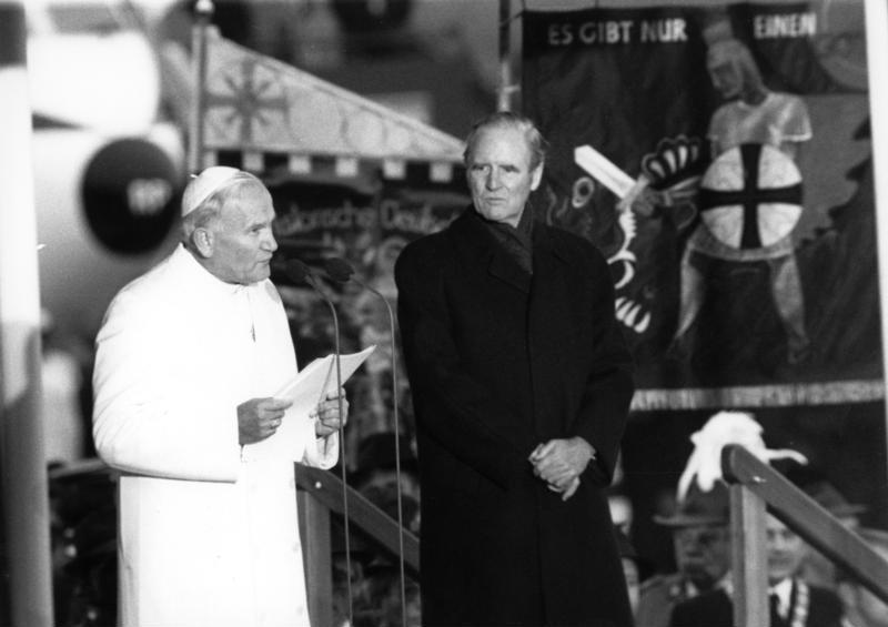 Vom 15. bis 19. November 1980 besuchte Seine Heiligkeit Papst Johannes Paul II. die Bundesrepublik Deutschland. Auf Einladung von Bundespräsident Karl Carstens hat der Papst seinen pastoralen Besuch mit einem offiziellen in Bonn verbunden. Am 15. November gab der Bundespräsident einen Empfang zu Ehren Seiner Heiligkeit auf Schloß Augustusburg in Brühl bei Bonn. Dort führte Papst Johannes Paul II. auch ein Gespräch mit Bundeskanzler Helmut Schmidt. Gleichzeitig traf Bundesaußenminister Hans-Dietrich Genscher mit Kardinal-Staatssekretär Casaroli zusammen. Im Anschluß an den offiziellen Teil begab sich der Papst auf den Bonner Münsterplatz, um dort eine Ansprache zu halten. Ferner bestand der pastorale Teil aus Besuchen in Köln, Osnabrück, Mainz, Fulda, Altötting und München. In allen diesen Städten hielt Papst Johannes Paul II. die Heilige Messe. Eigentlicher Anlaß seines Aufenthaltes in der Bundesrepublik war der 700. Todestag von Albertus Magnus (1193-1280), dessen Grab der Papst in Köln besuchte. Papst Johannes Paul II. hält eine Ansprache bei seiner Ankunft auf dem Flughafen Köln/Bonn. Rechts: Bundespräsident Karl Carstens (15. November 1980)